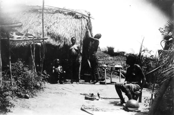 Mayumbe : campement des travailleurs Sana [sic : Sara] et leurs familles, chemin de fer Congo Océan